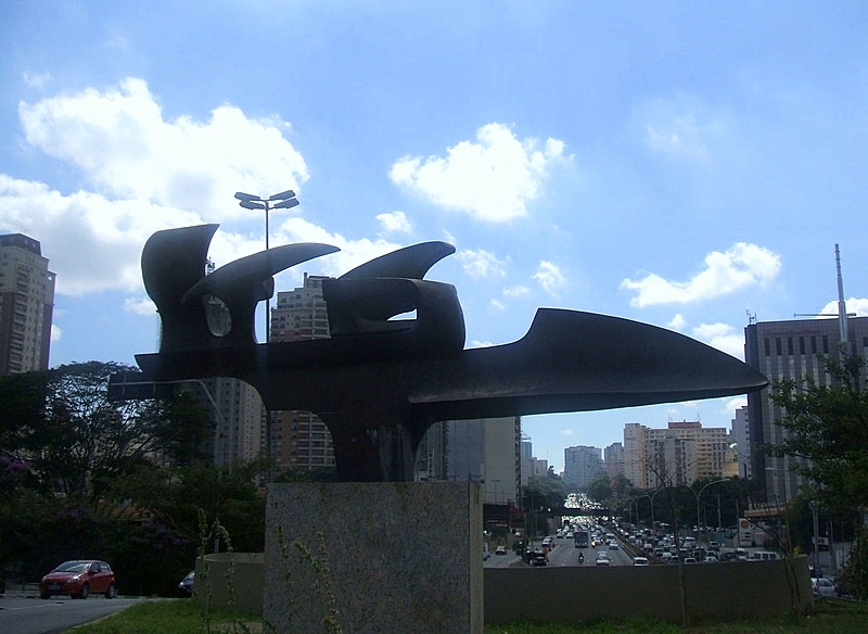 Monumento a Ayrton Senna, sobre a Avenida 23 de Maio, próximo ao Parque do Ibirapuera. São Paulo, Brasil.